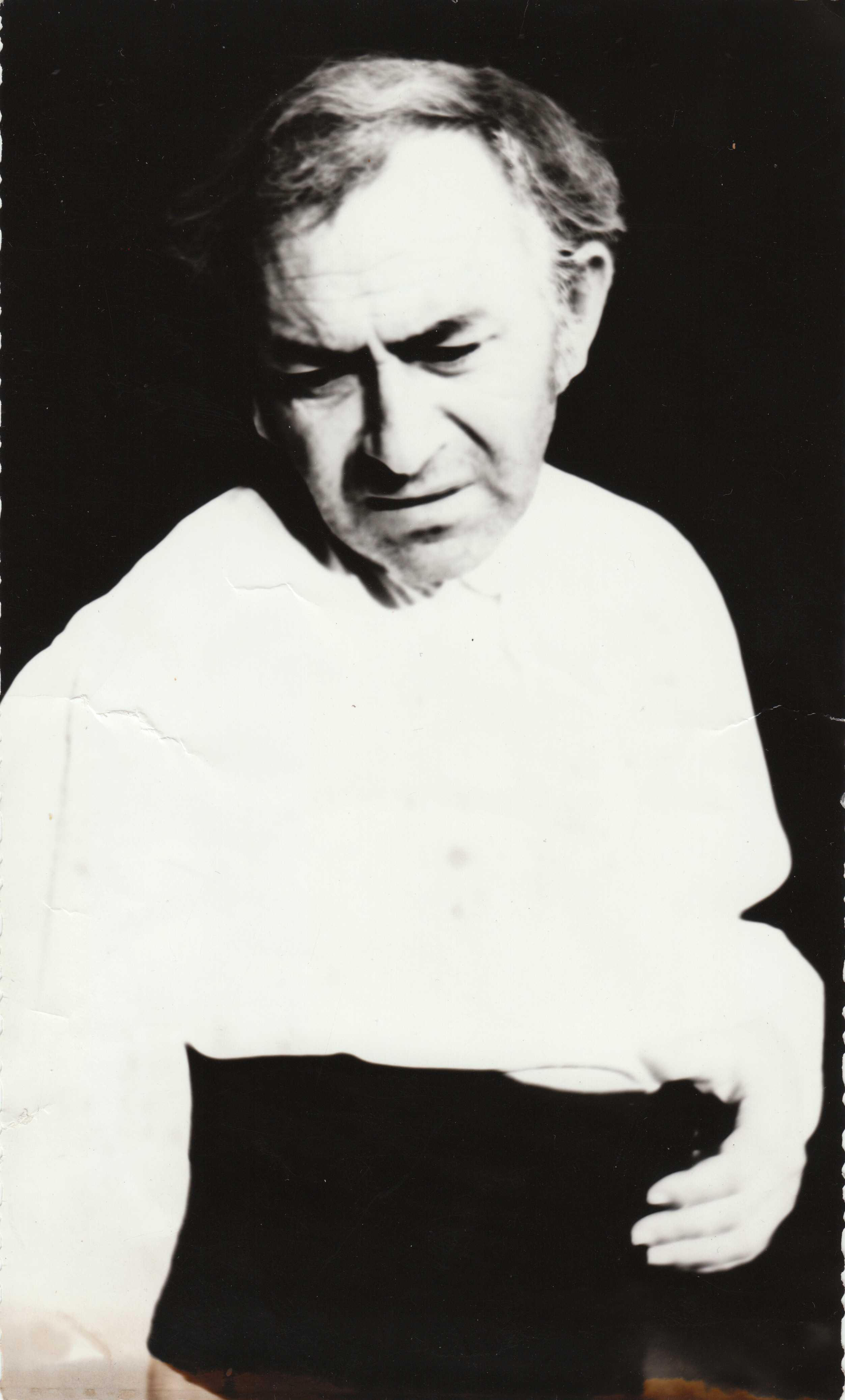 „Боряна“ - режисьор Слави Шкаров Минко Минков в ролята на Златил